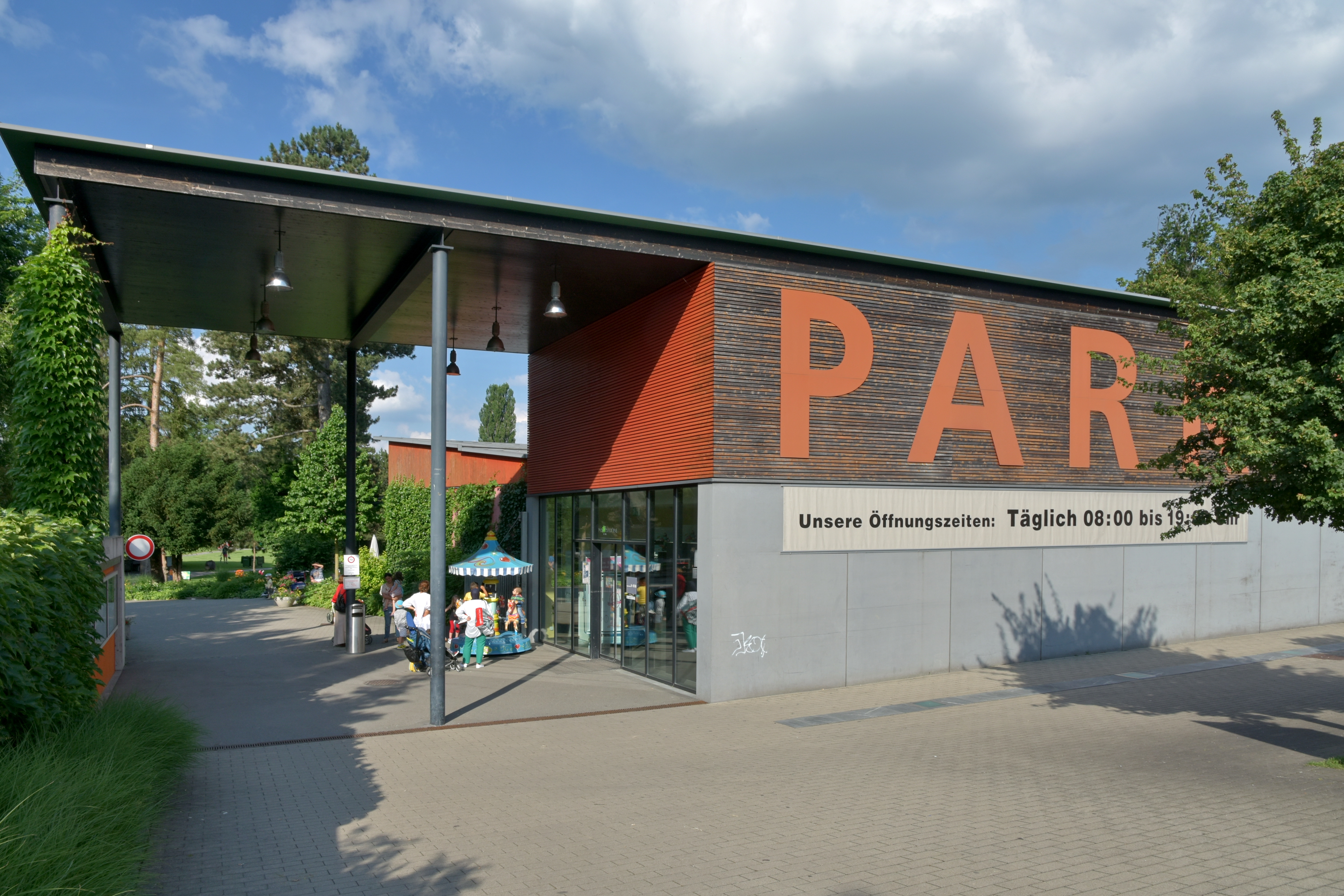 Adele & Gottlieb Duttweiler's' Park im Grüene in Rüschlikon (Switzerland)